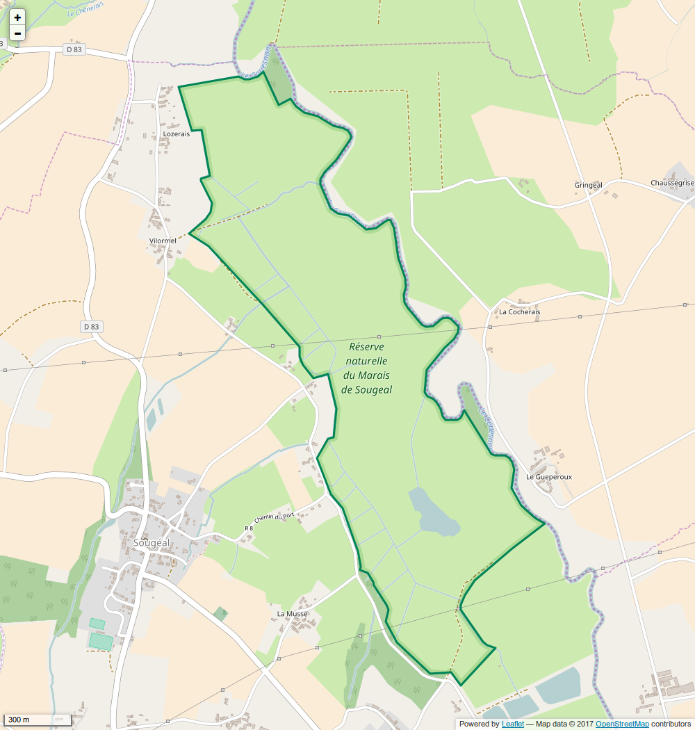 Périmètre de la RNR du Marais de Sougéal.